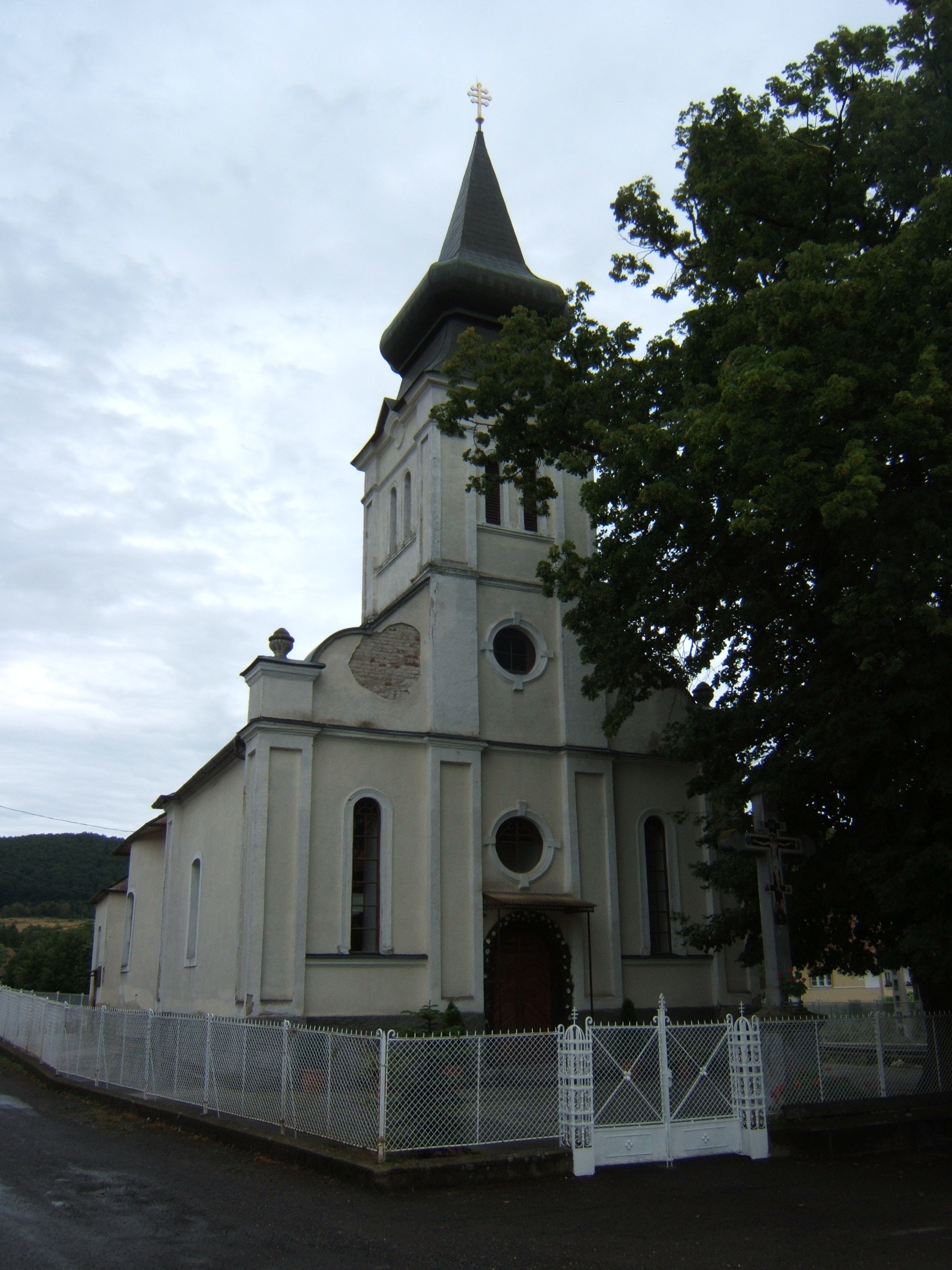 Baskó, templom